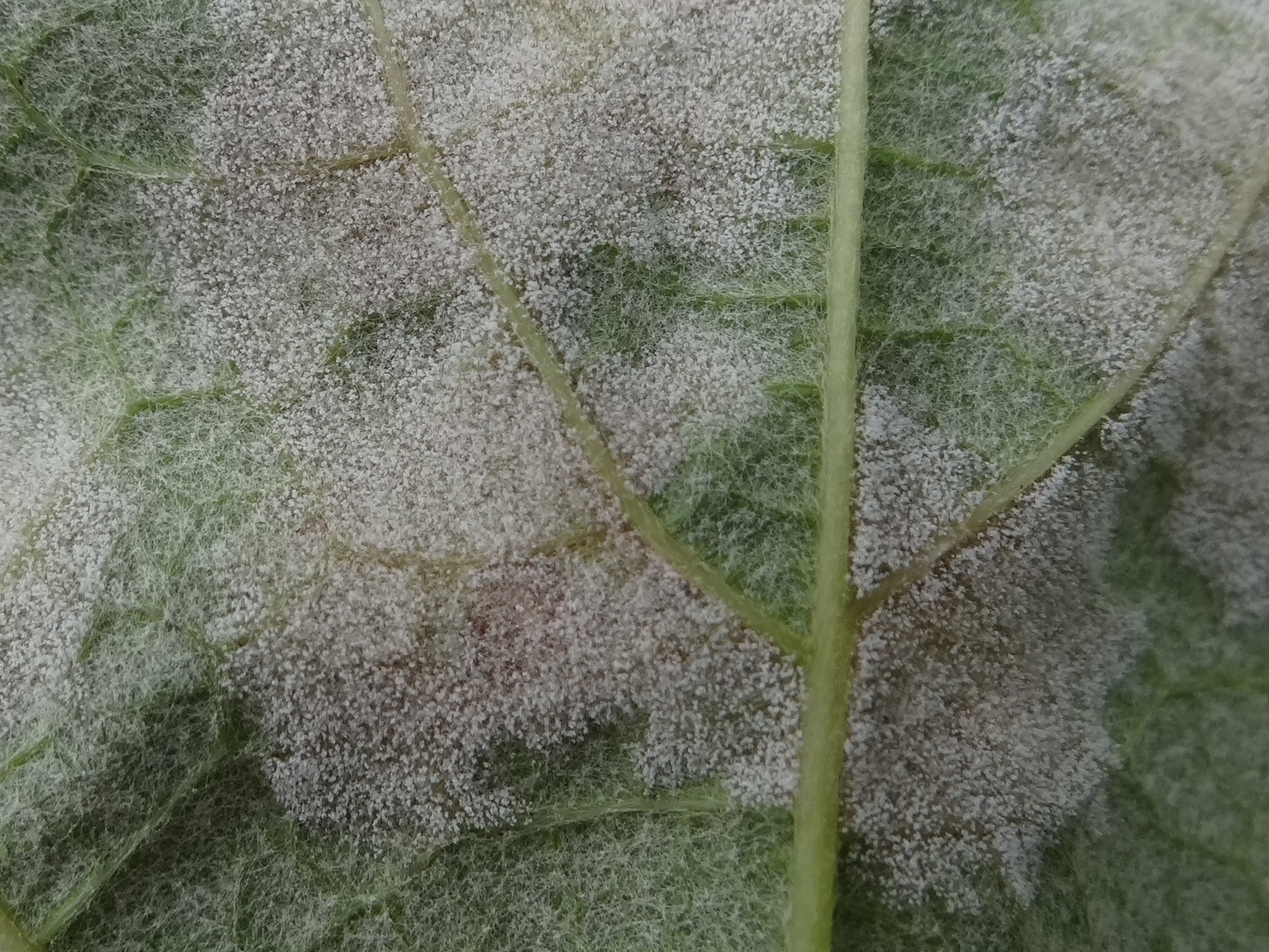 Plasmopara viticola on Vitis vinifera